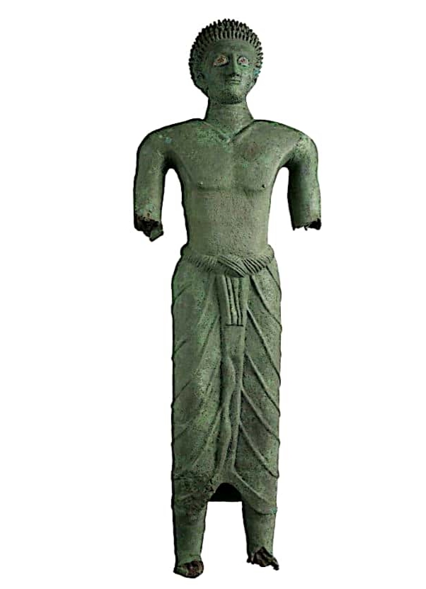 Hotar ethat